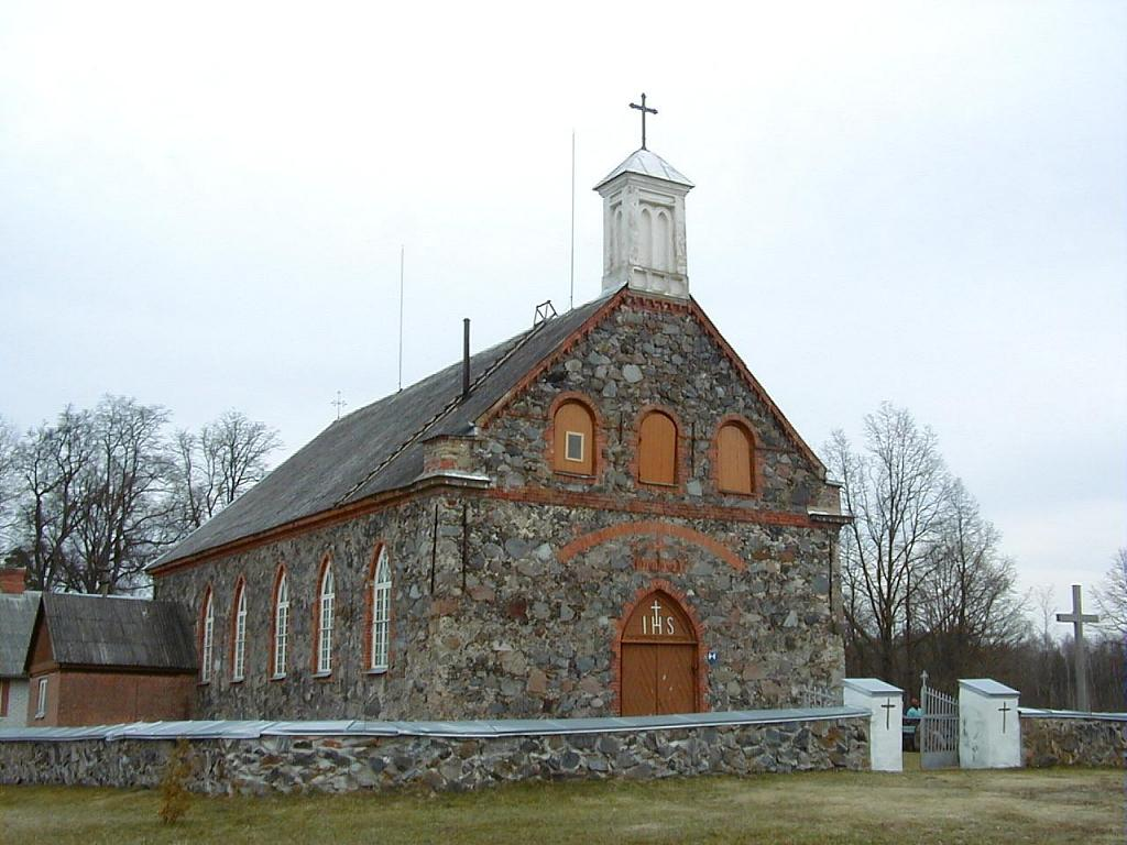 Ozolaines katoļu baznīca 2002-04-13